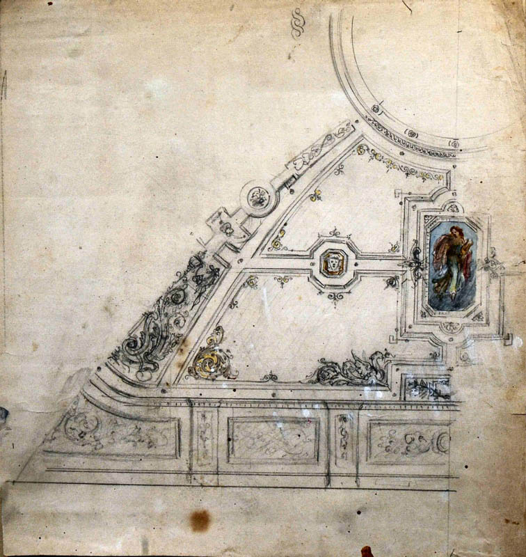 Architekturentwurf